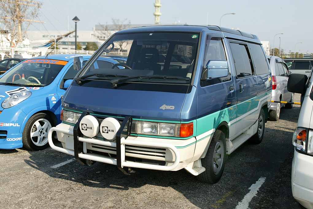 Nissan Vanette Largo Umibouzu